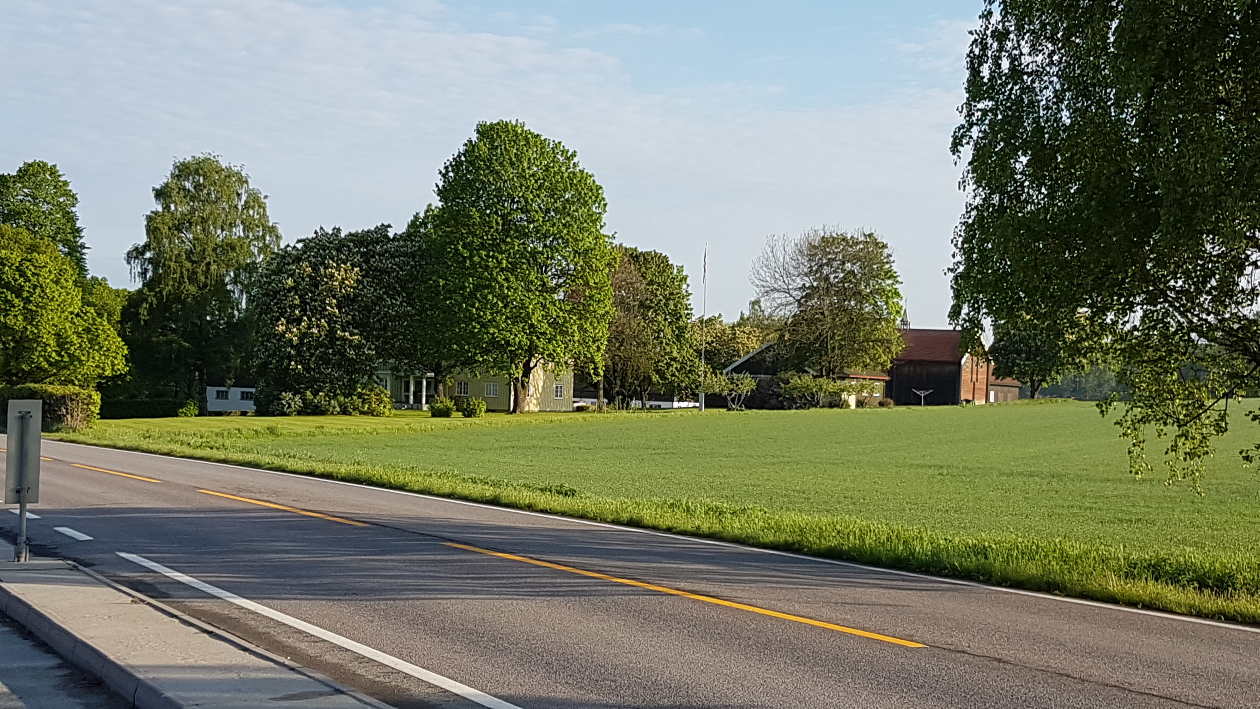 Bygningsmassen er plassert rundt et romslig firkanttun og det store våningshuset ligger nærmest veien